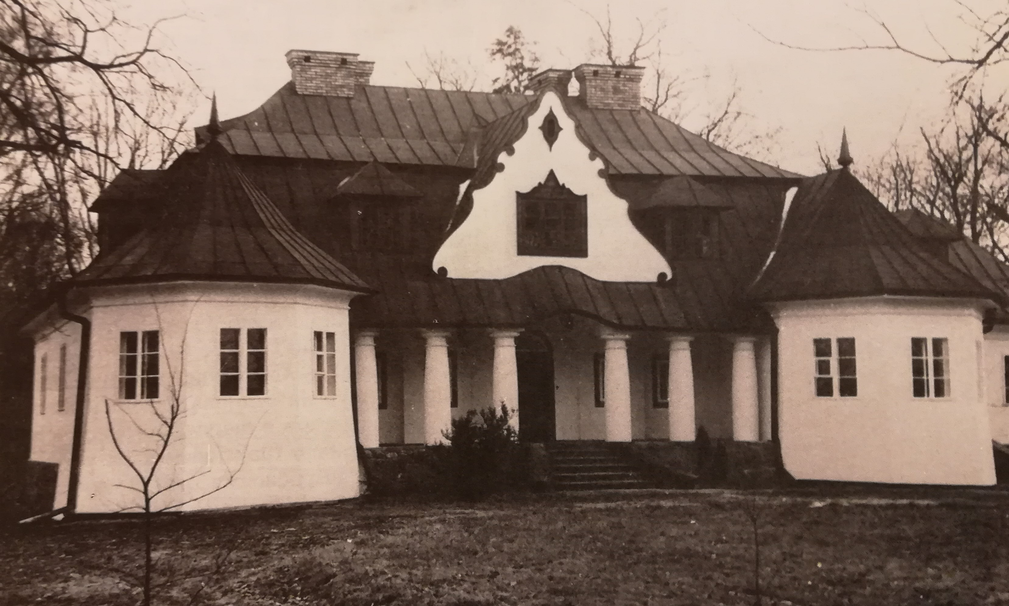 Dwór w Kuznocinie przed 1992r.